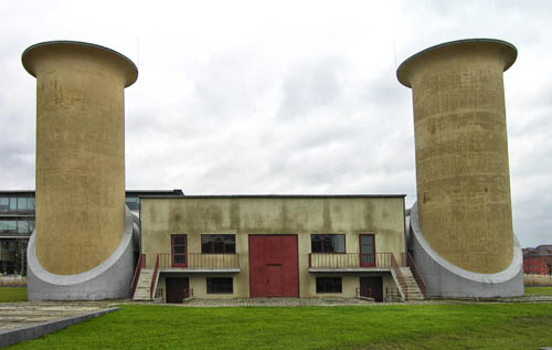 Schallgedämpfter Motorenprüfstand Aerodynamischer Park, Berlin-Adlershof